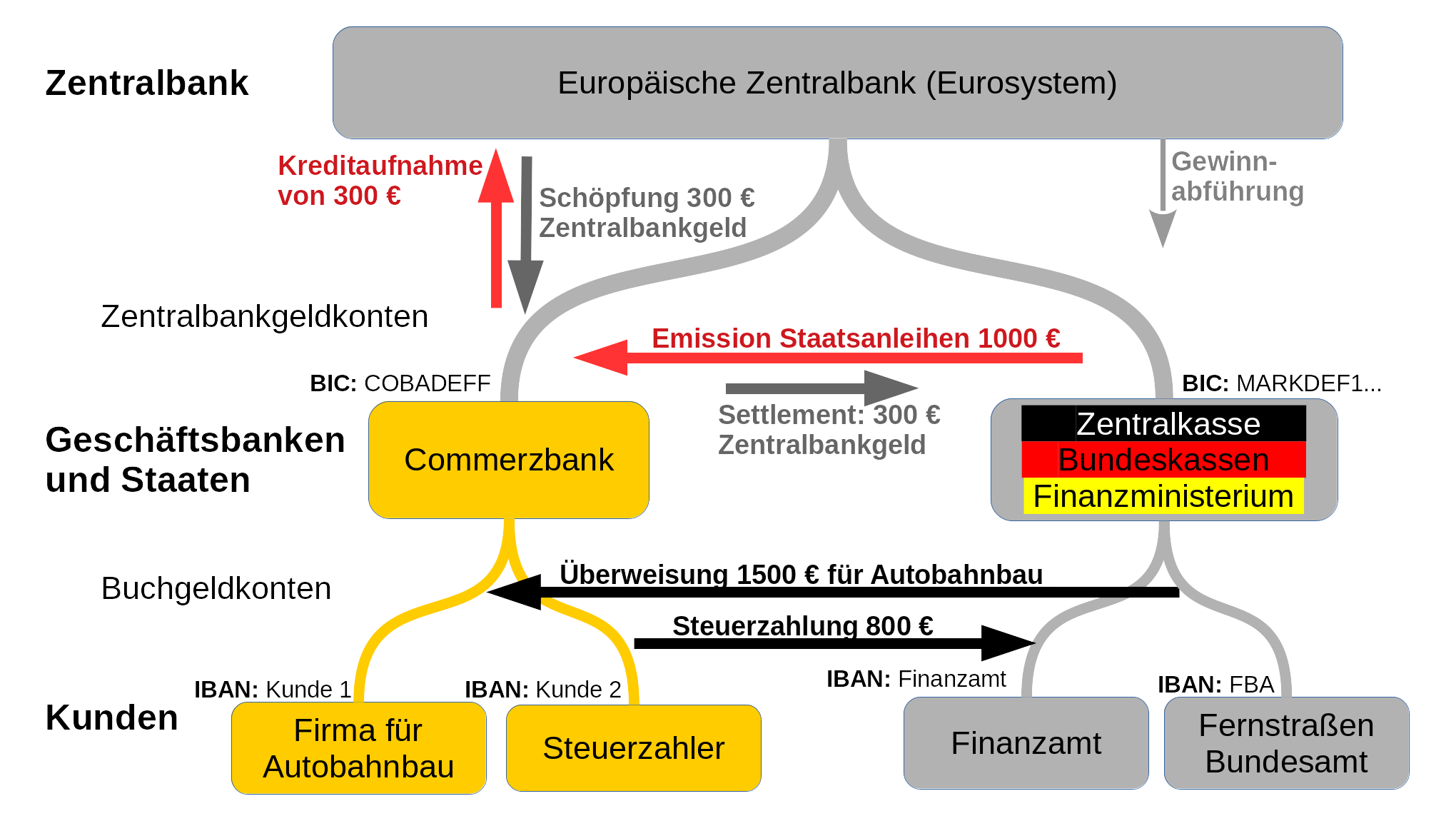 Bankenhierarchie mit Staat und beispielhafte Ausgaben und Einnahmen eines Staates: Der deutsche Staat hat durch Ausgaben und Steuereinnahmen einen negativen Saldo mit der Comerzbank von 700 €. Nach Emission einer Staatsanleihe über 1000 € beschafft sich die Commerzbank 300 € Zentralbankgeld für das Settlement mit dem Staat.